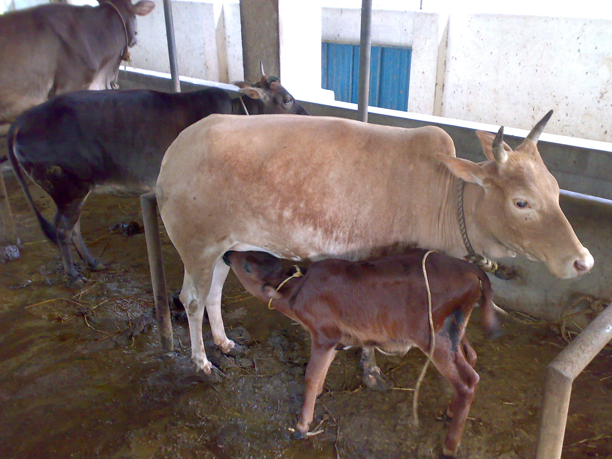 കാസർഗോഡ് കുള്ളൻ, തിരുവന്തപുരത്ത് നിന്നും ശേഖരിച്ച ചിത്രം